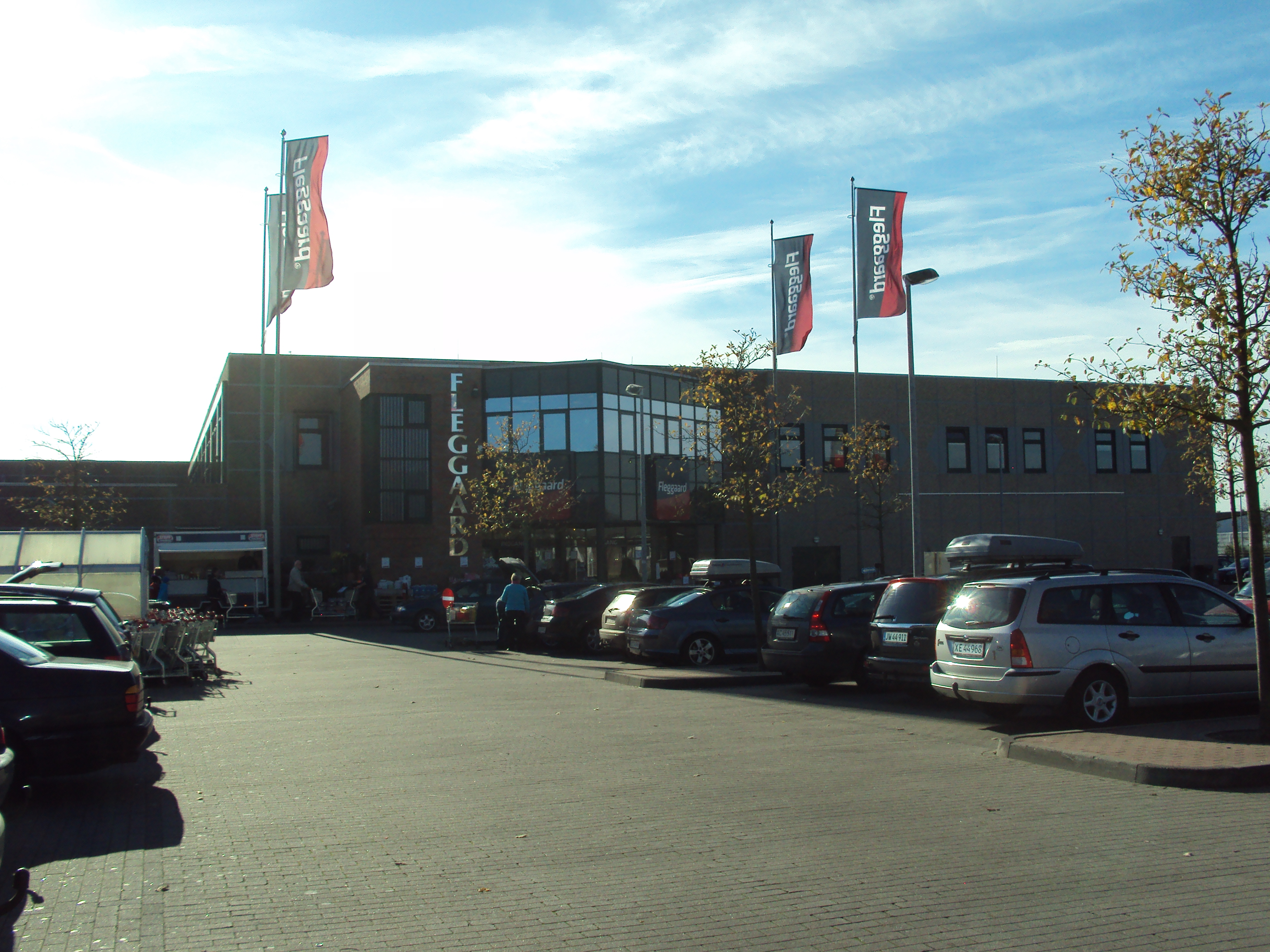 Fleggaard grænsebutik ved Harrislee; Industrieweg 27, 24955 Harrislee